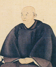 帆足杏雨像 絹本墨画淡彩軸層